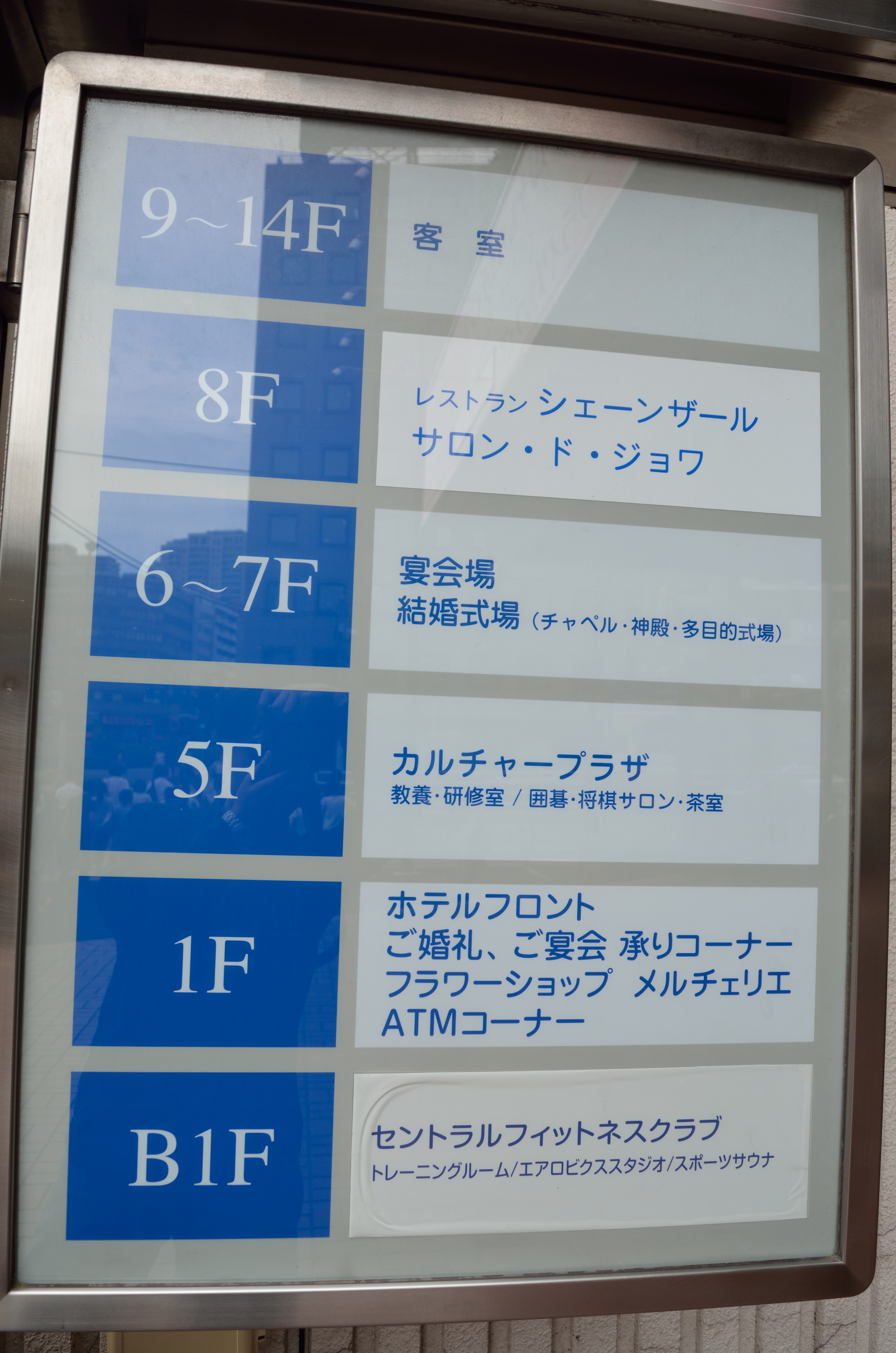 東京都品川区西五反田に2015年9月まであった複合施設「ゆうぽうと」のフロア構成。